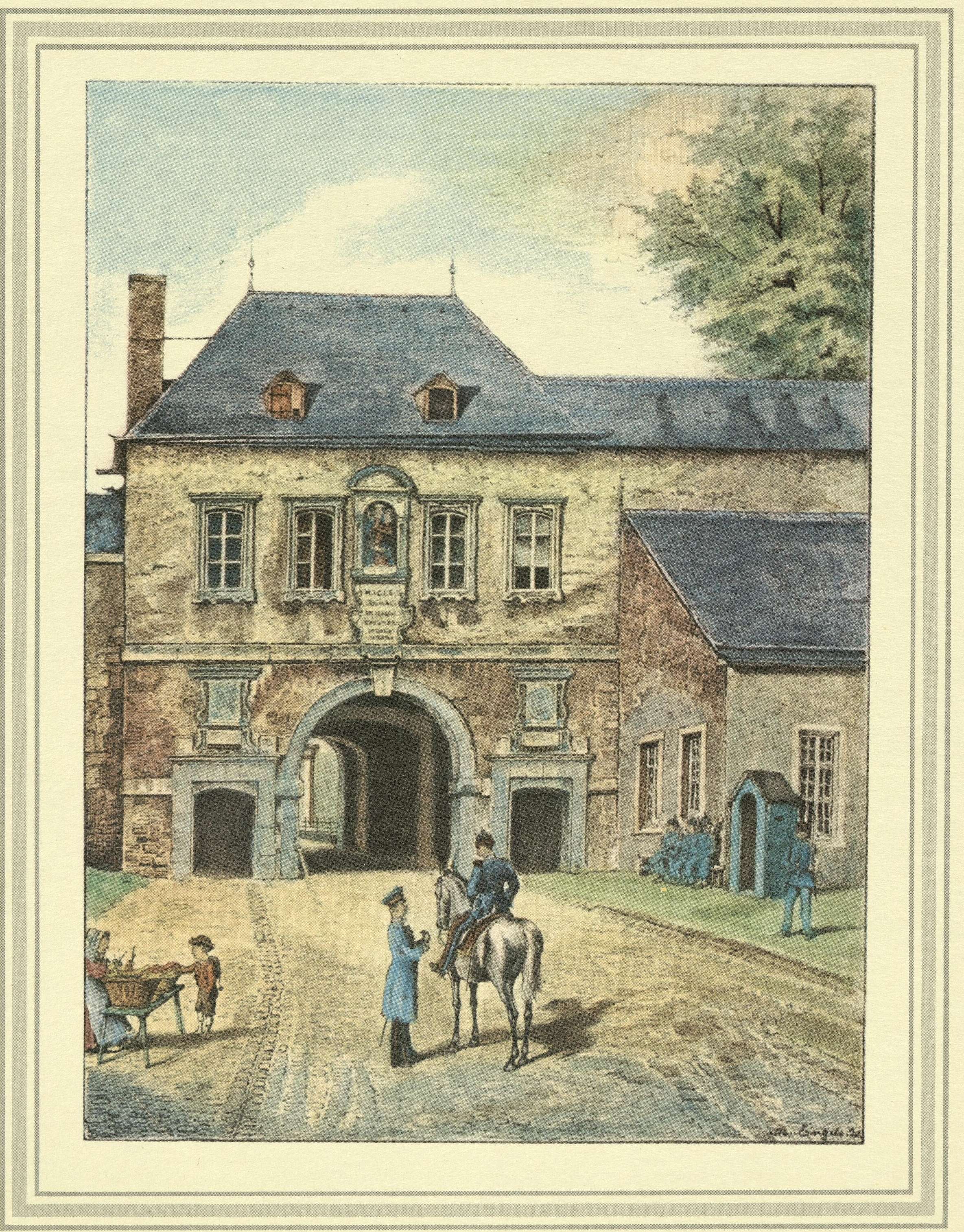 Dessin pittoresque de la forteresse de la Confédération germanique (Bundesfestung) Luxembourg par Michel Engels (1851-1901): XVIII - La porte Neuve (côté intérieur)